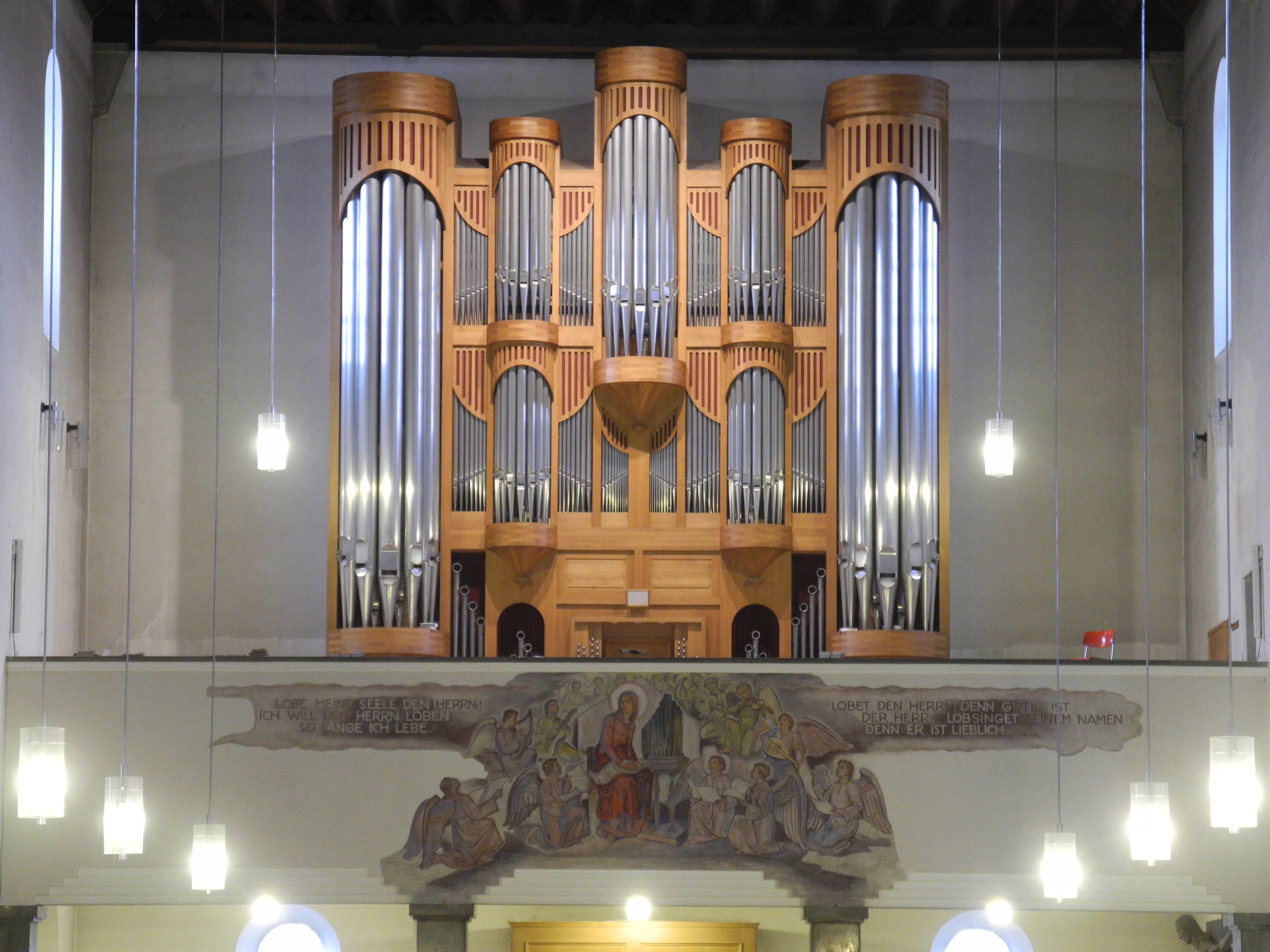 St. Anton- 33-III-P von Jann, 1996